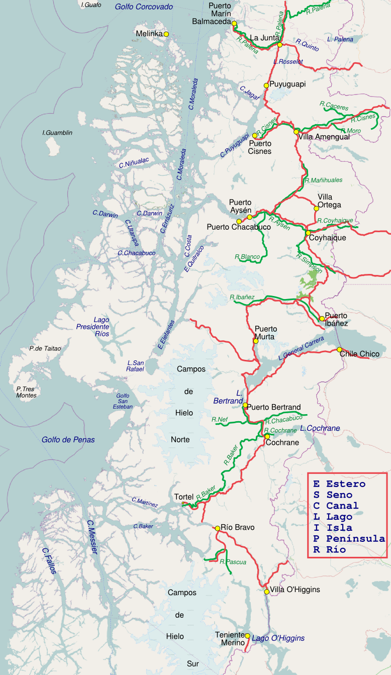 Mapa de Aisen obtenido de , con Carretera Austral y algunos ríos.